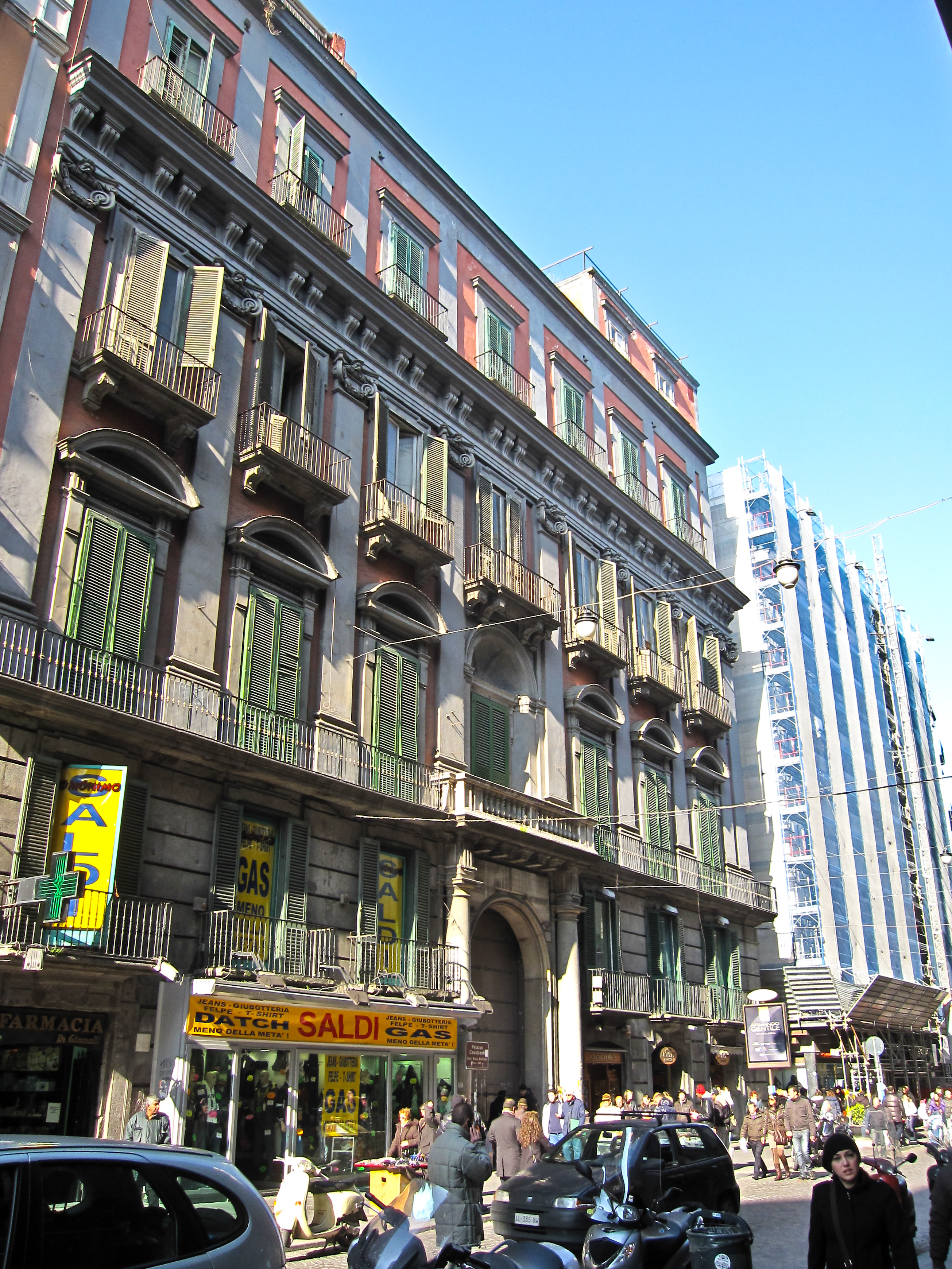 Napoli - Palazzo Cavalcanti. La facciata su Via Toledo